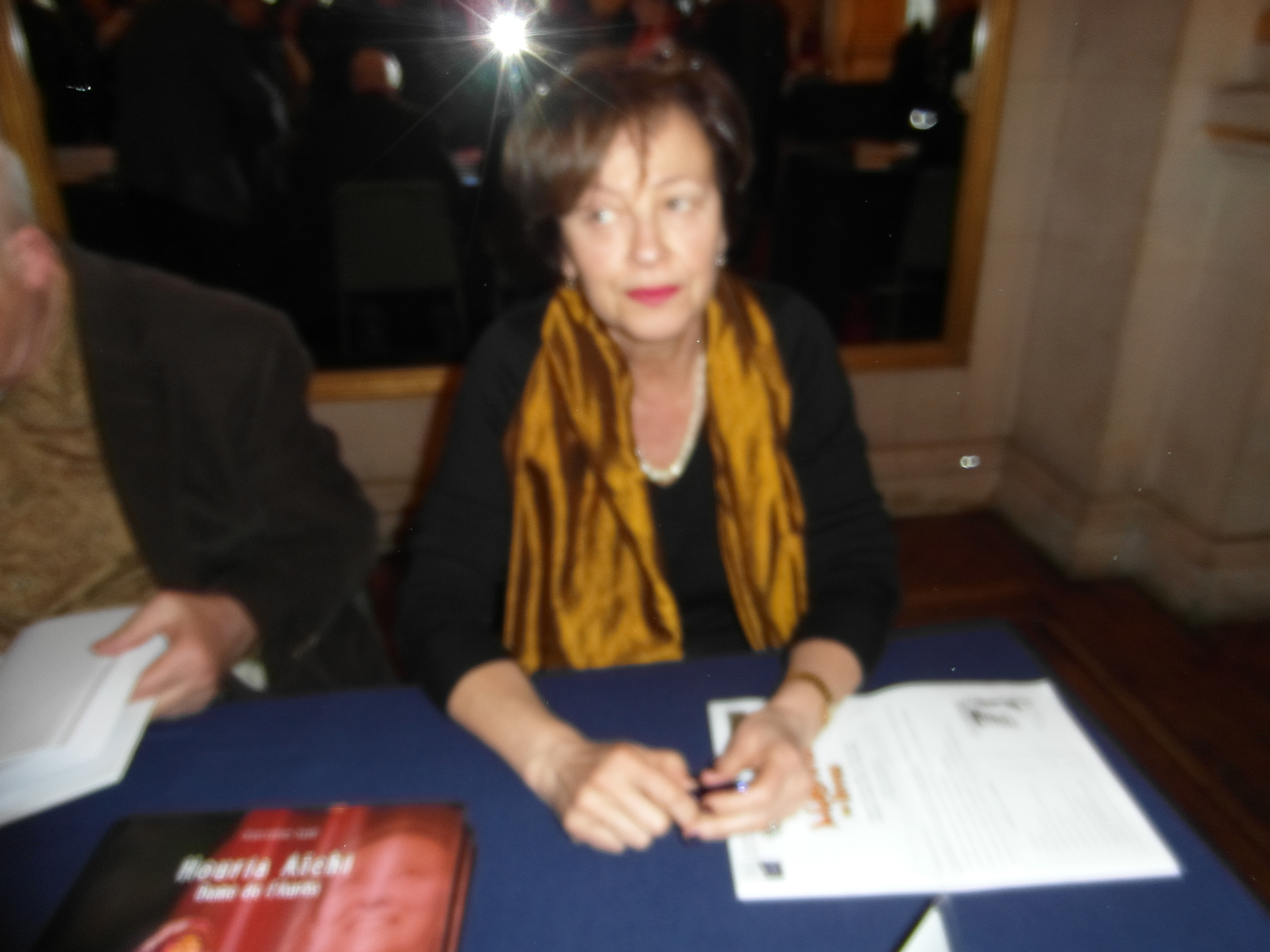 20e Maghreb des Livres, Paris, 8 février 2014